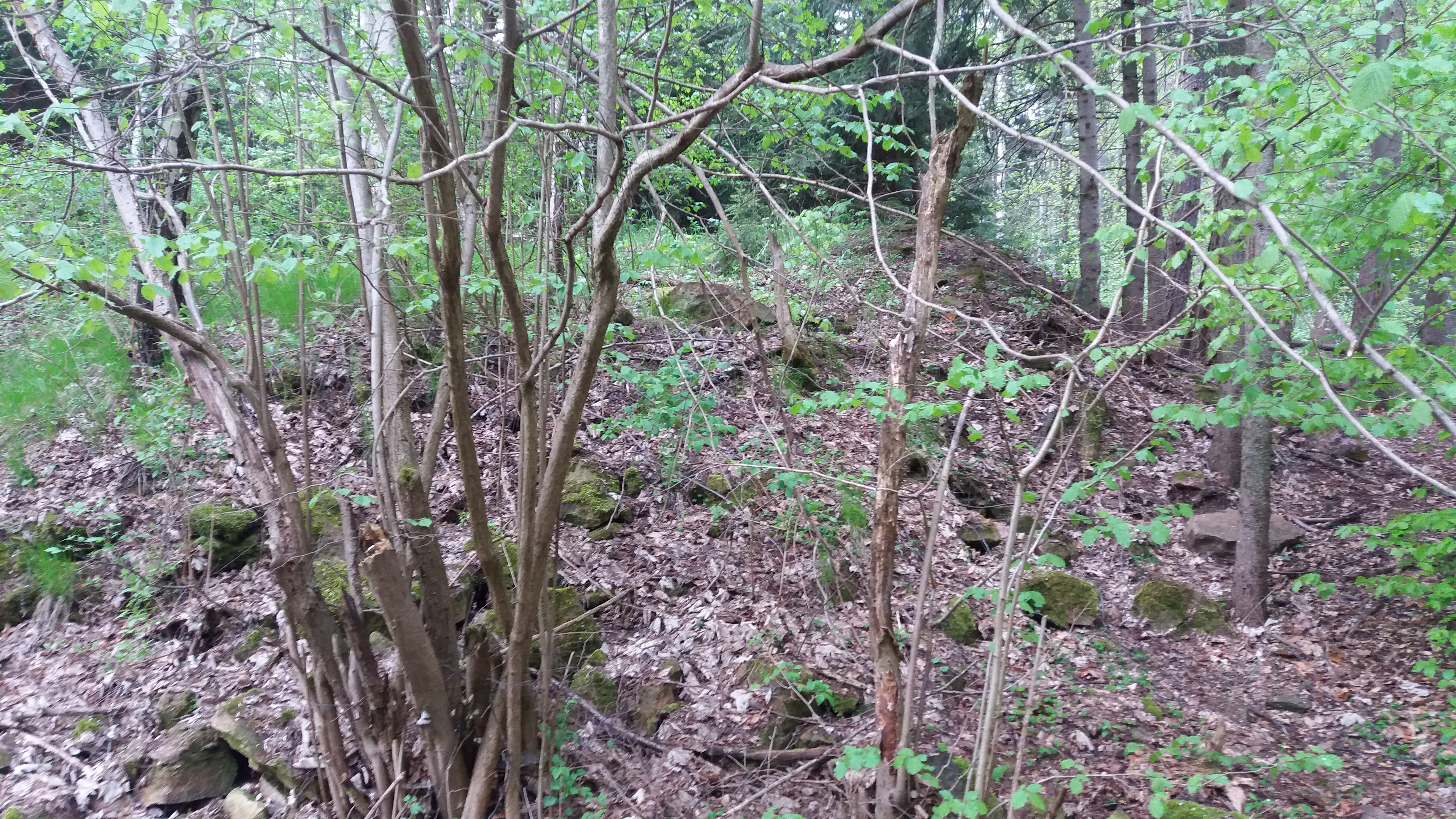 Ruiny kostela sv. Jana Křtitele (Janovičky)